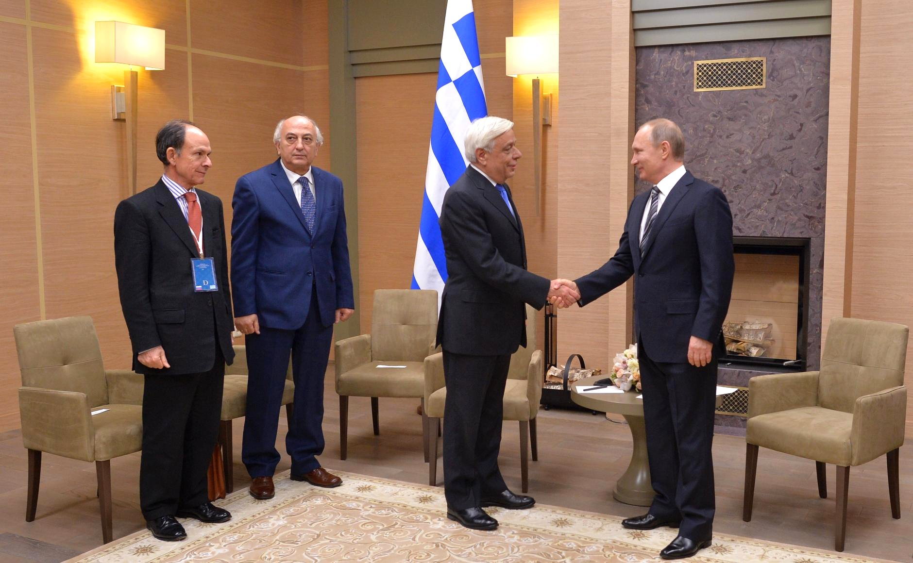 Президент России Владимир Путин с Президентом Греции Прокописом Павлопулосом